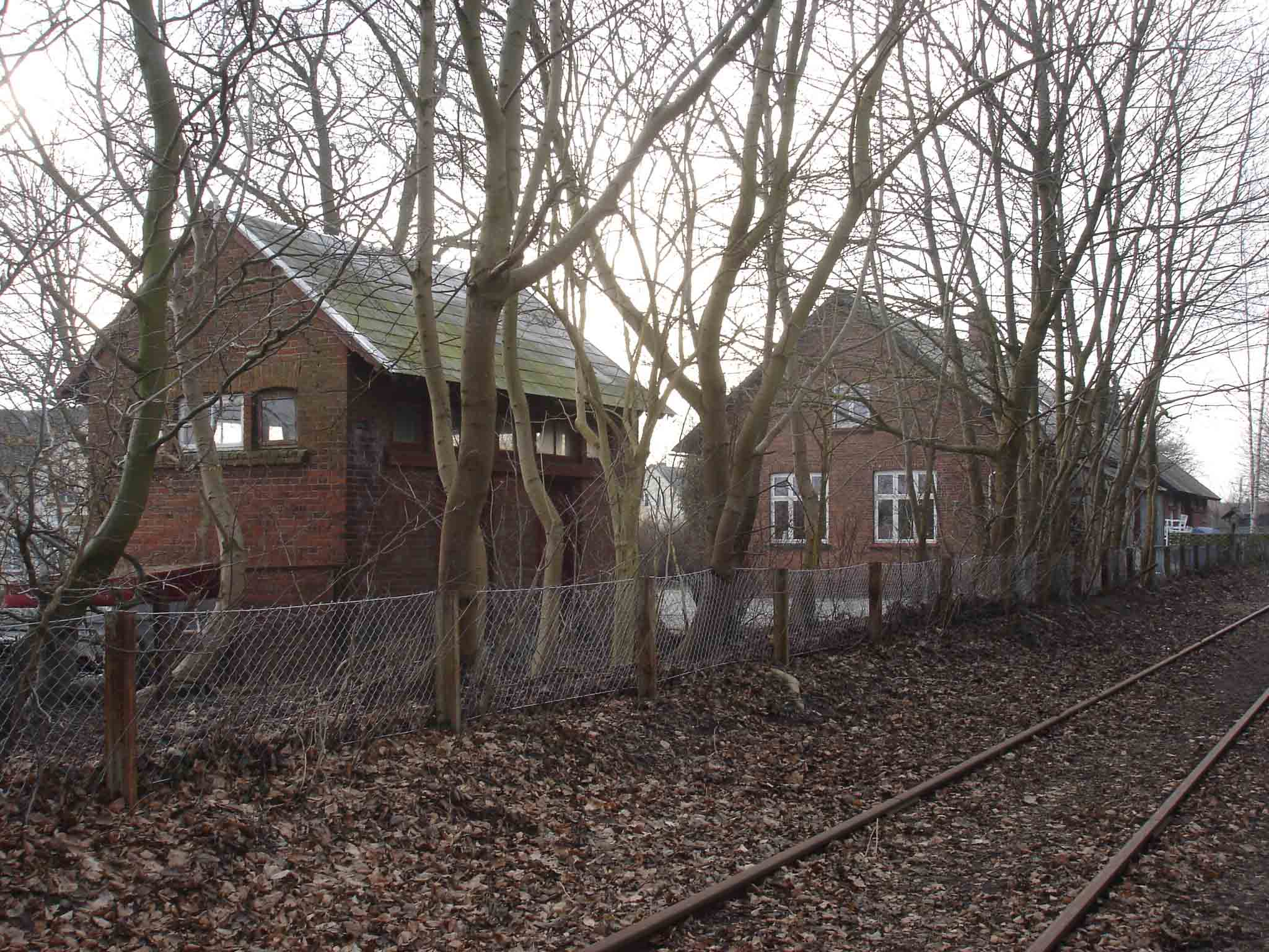 Ebberup Station, sporsiden fra nordøst